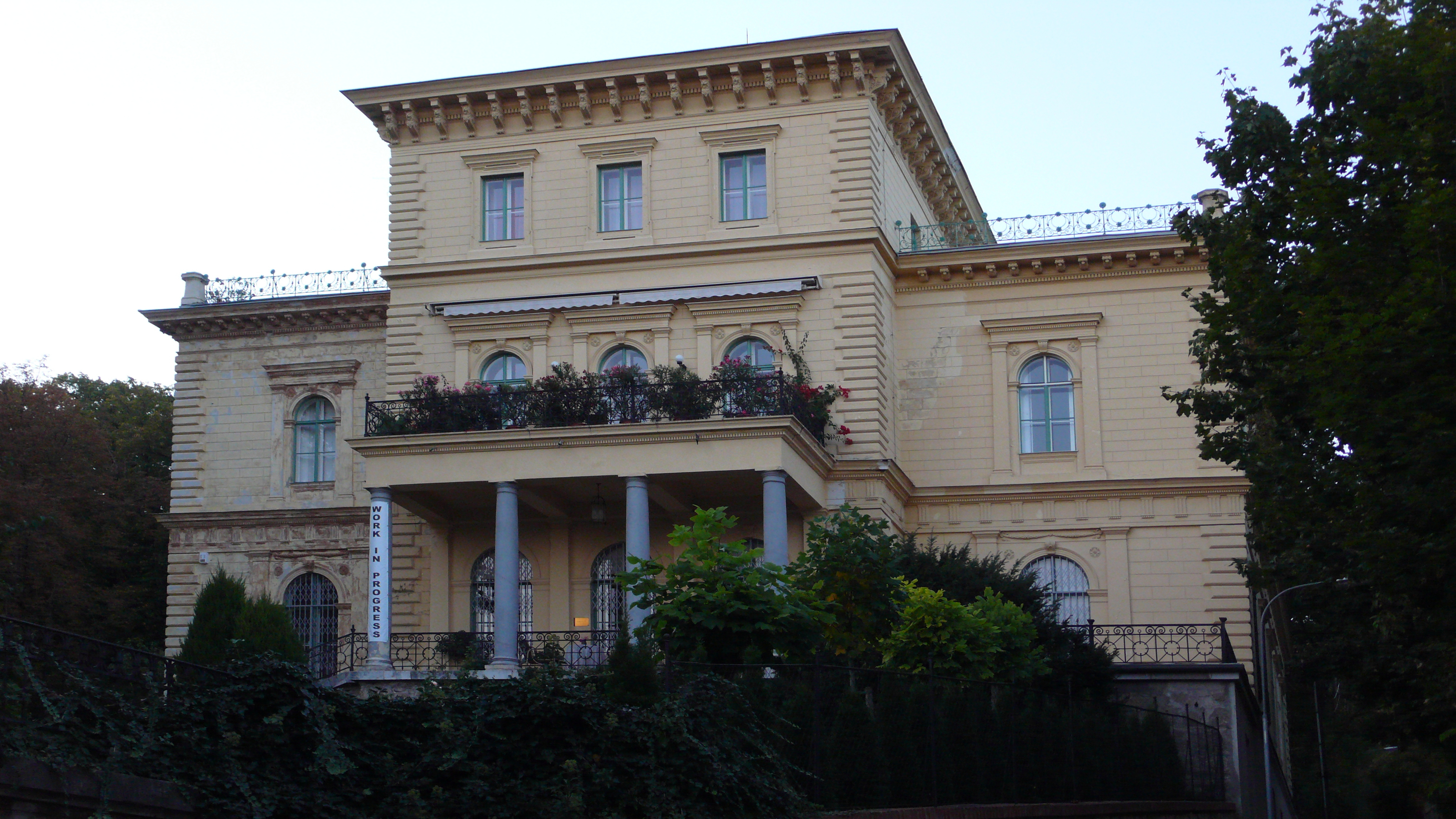 Villa Epstein/Rainer, Rainerweg 1, Baden, Niederösterreich.